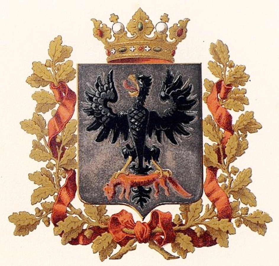 Official Russian Empire coat of arms Yakutsk Oblast. Герб Российской Империи Якутской области в Гербовнике Бенке. Утверждён Императором Всероссийским Александром Вторым в 1878 году.